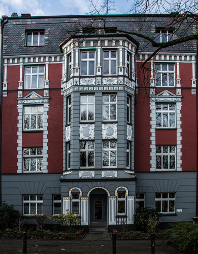 Stolpersteine Dortmund